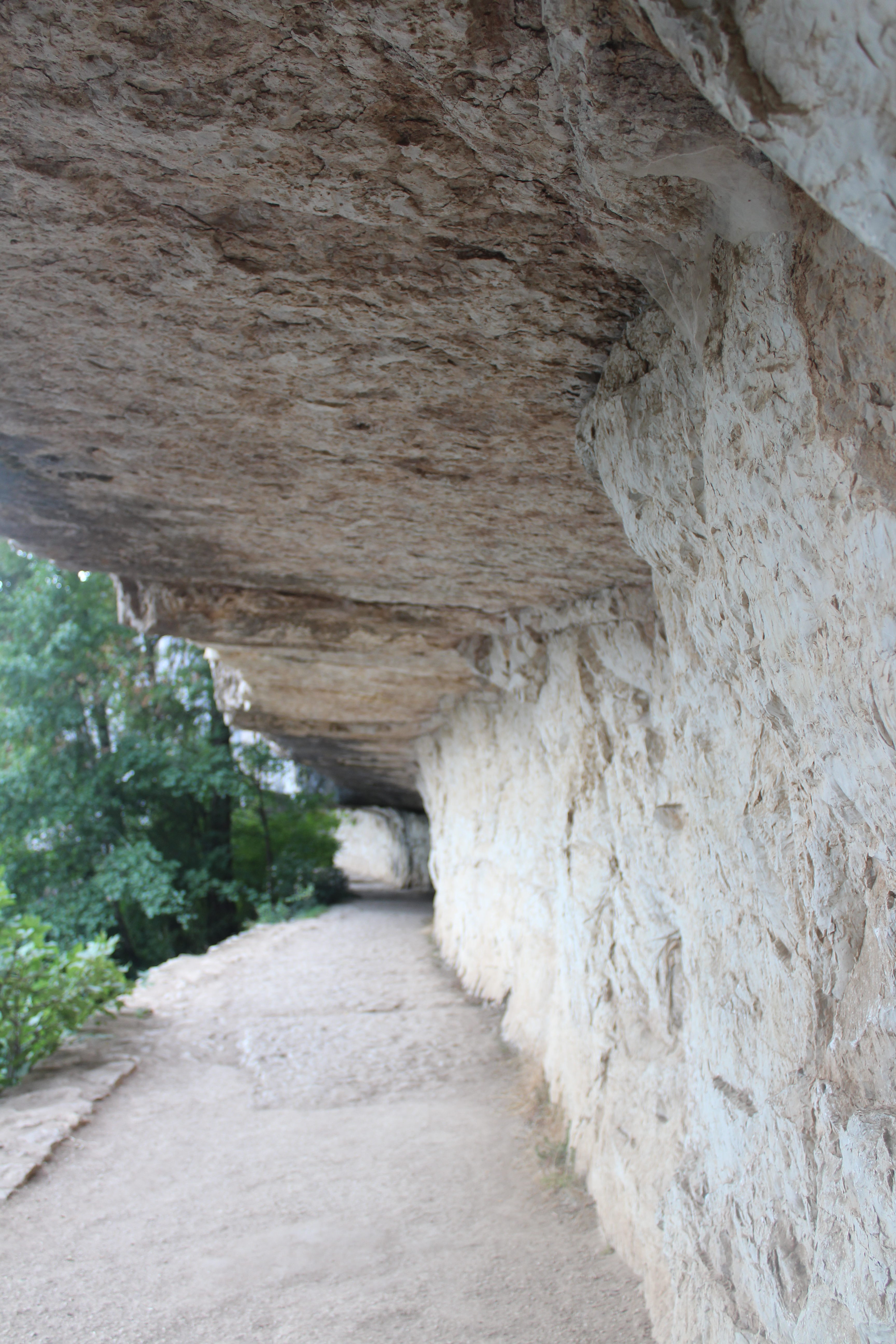 Chemin de halage de Ganil entre Bouziès et Saint-Cirq-Lapopie (département du Lot, France) situé en bordure de la rivière du Lot. Chemin creusé dans la falaise au XIXe siècle pour permettre aux chevaux de tracter les gabares afin de leur faire remonter le courant.